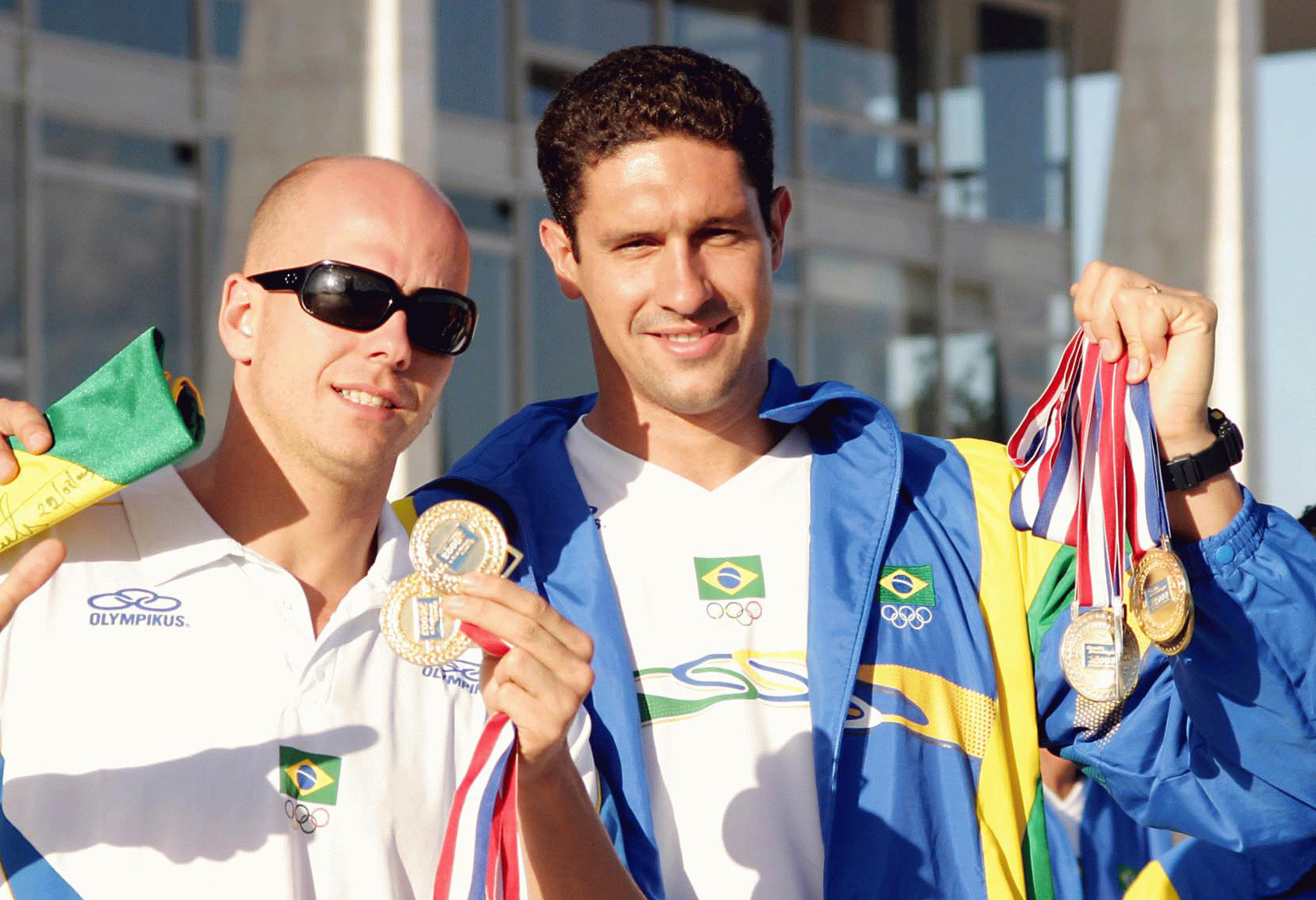 Os nadadores brasileiros Fernando Scherer (à esquerda) e Gustavo Borges.